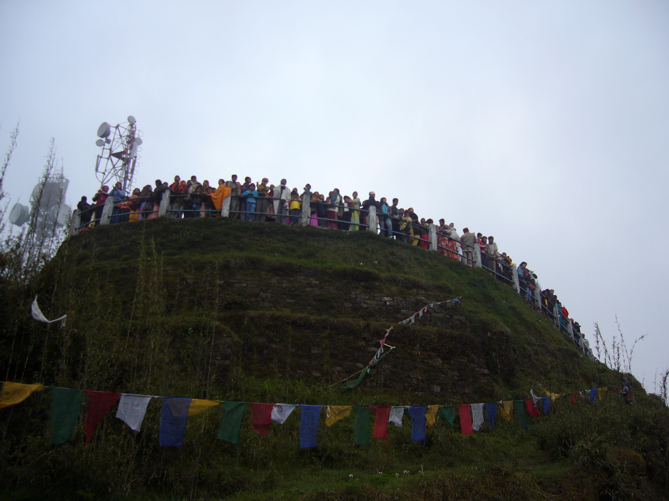 Tiger Hill Darjeeling West Bengal India